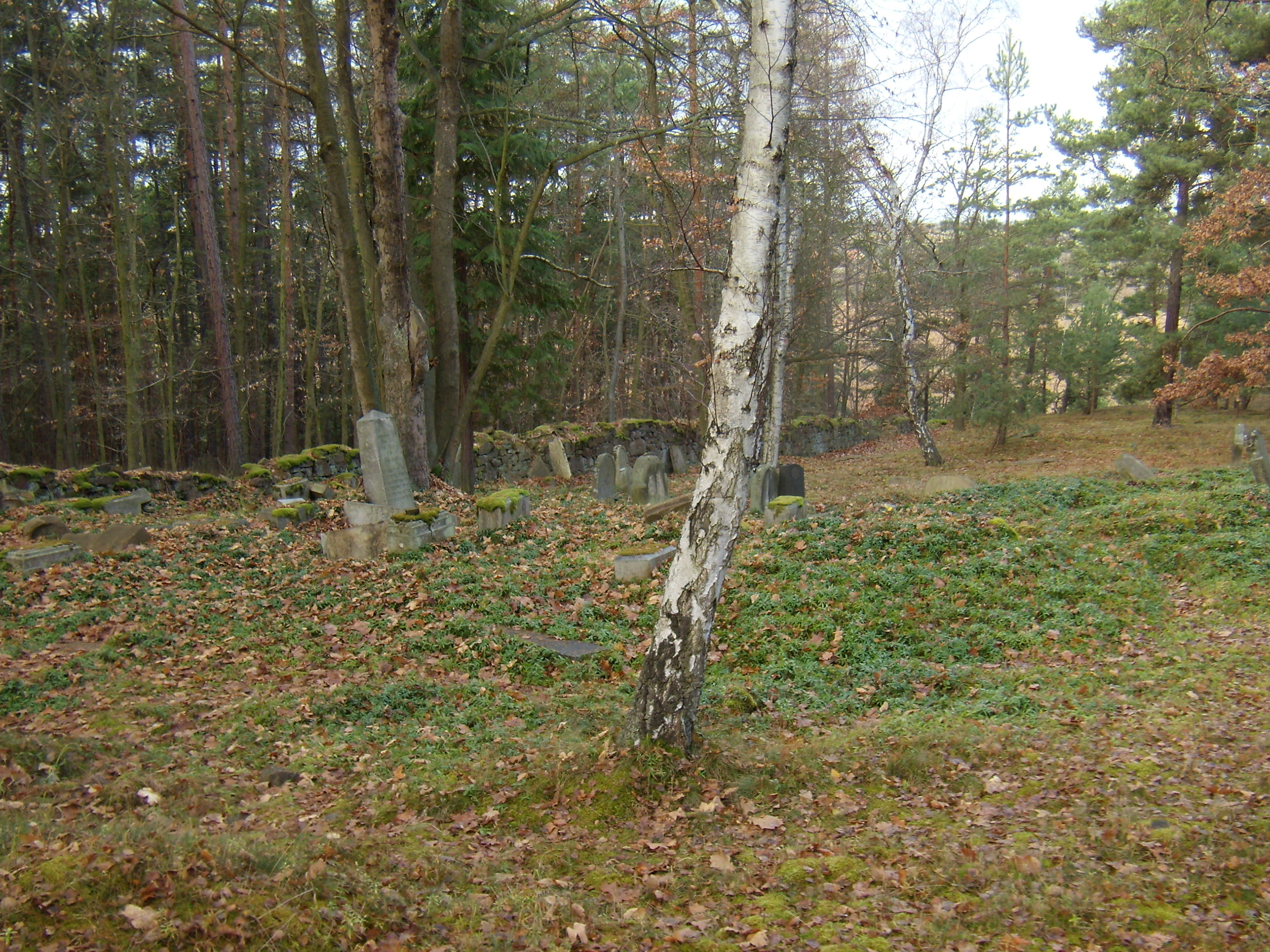 Pňovany ŽH 01